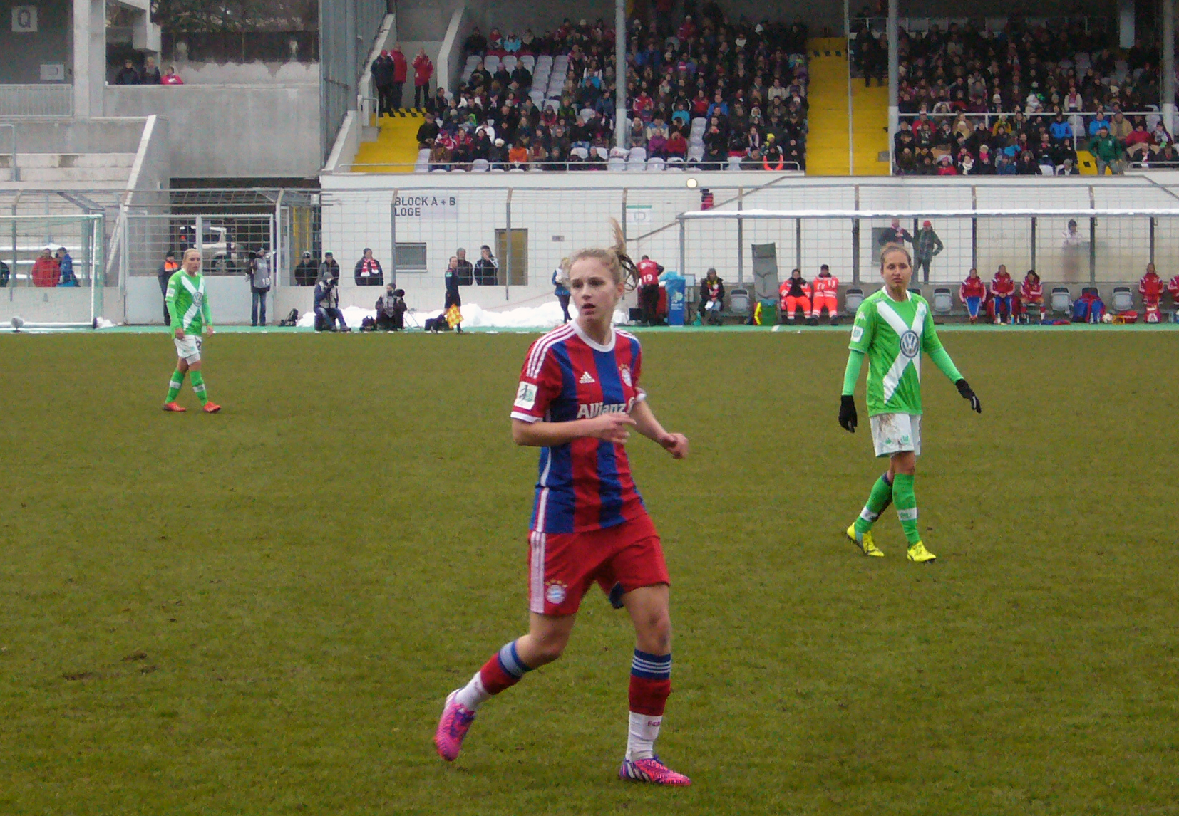 Vivianne Miedema